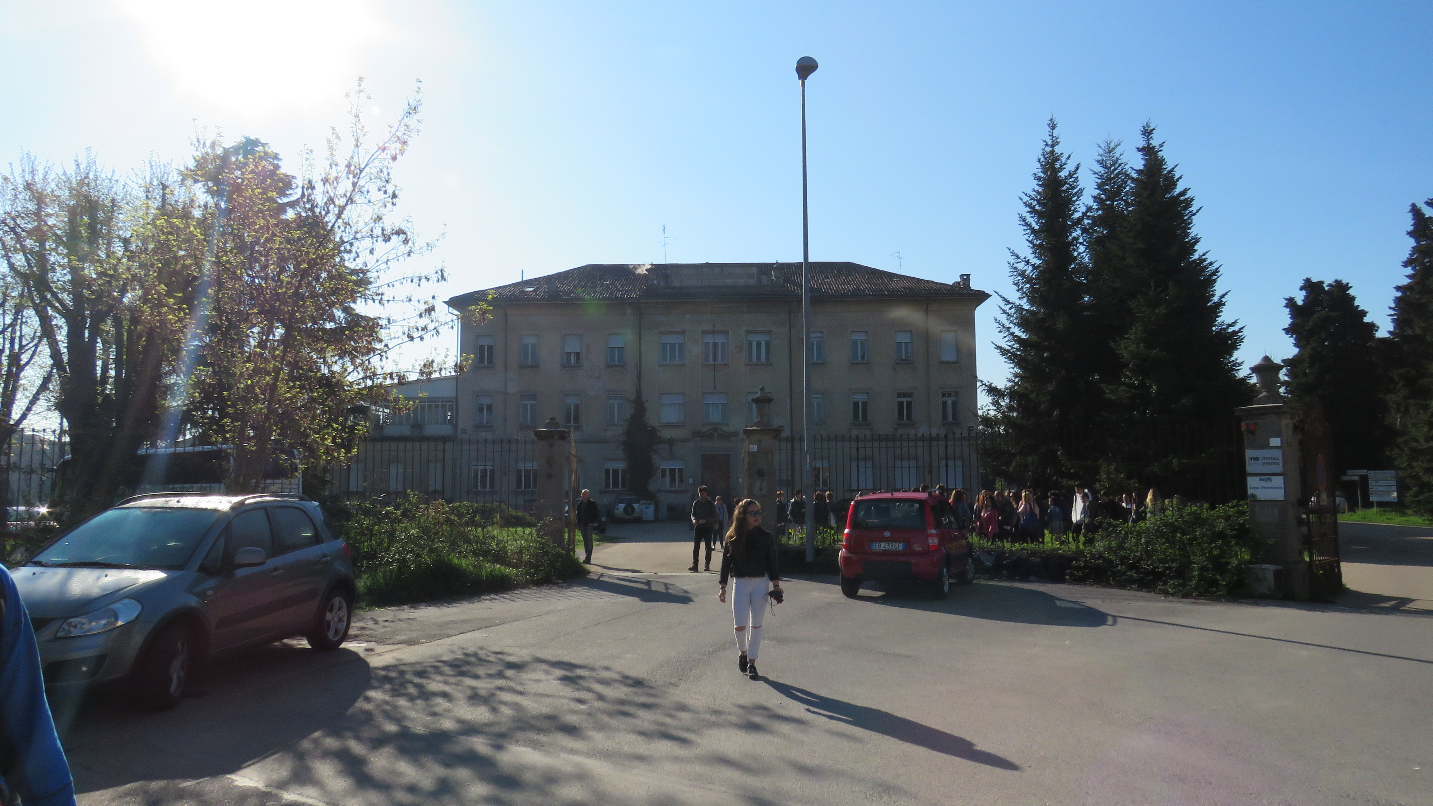 בניין ההנהגה של גרוליאסקו